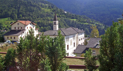 Il paese visto dal castelliere.